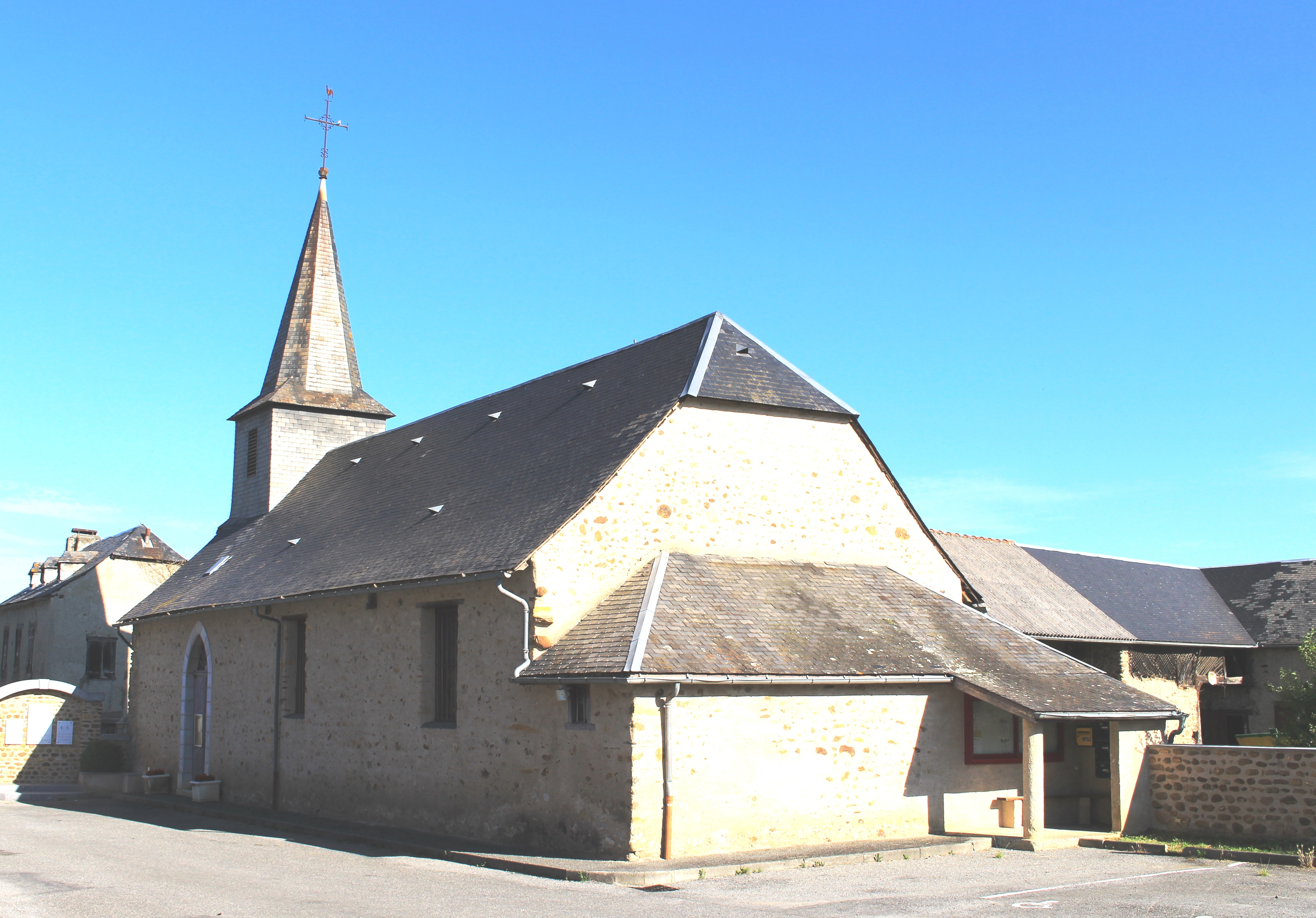 Église de la Présentation-de-la-Sainte-Vierge de Lagrange (Hautes-Pyrénées)